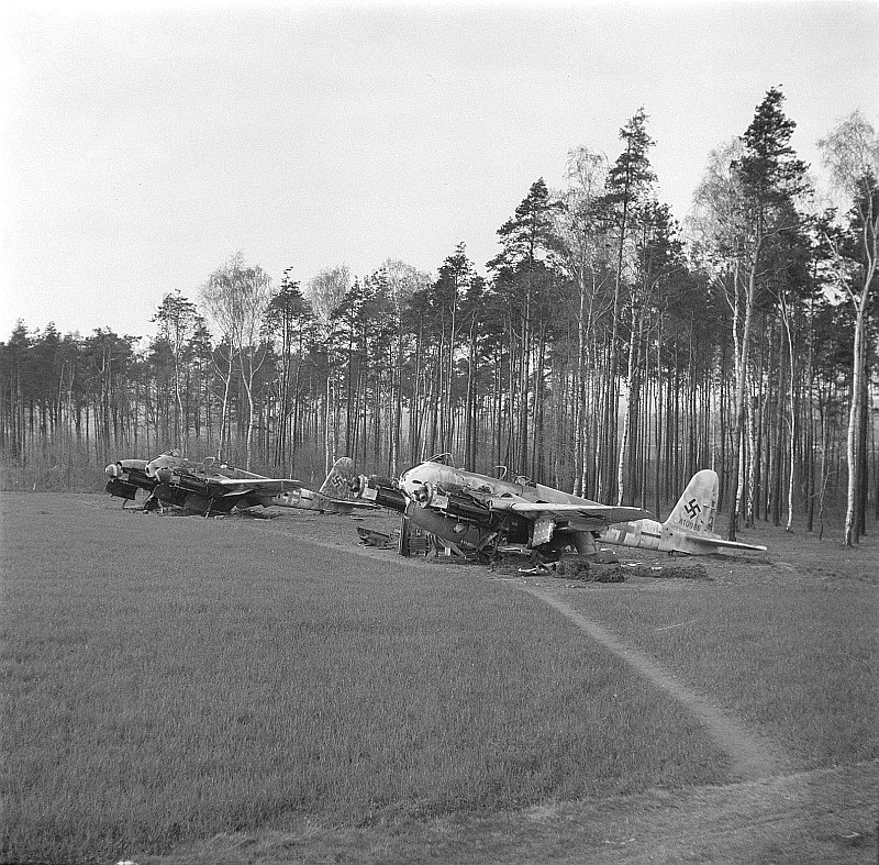 Original image description from the Deutsche Fotothek Ehemaliger Feldflugplatz (Standort unbekannt). Zerstörer und Jagdbomber Messerschmitt Me 410 "Hornisse", am Boden zerstört